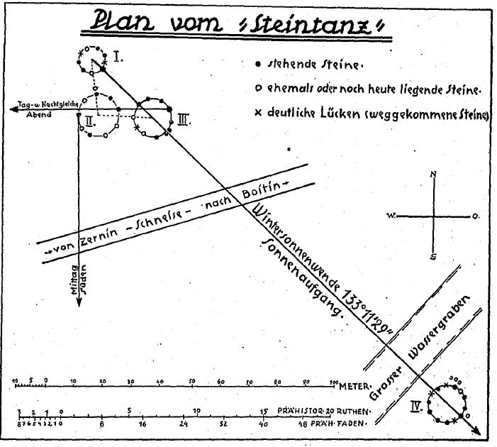 Werner Timm Mecklenburgs "Steintanz"